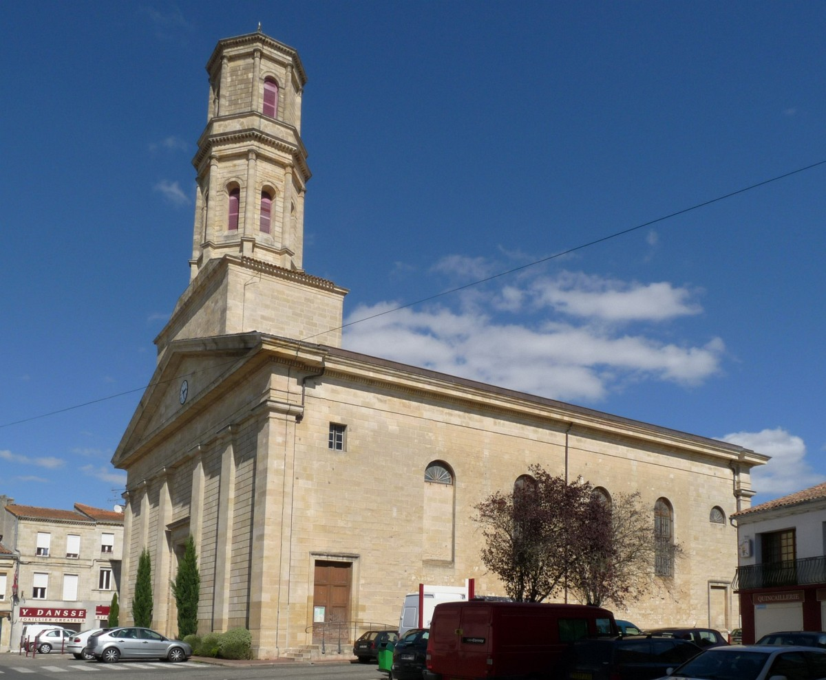 église de Pauillac, Gironde, France